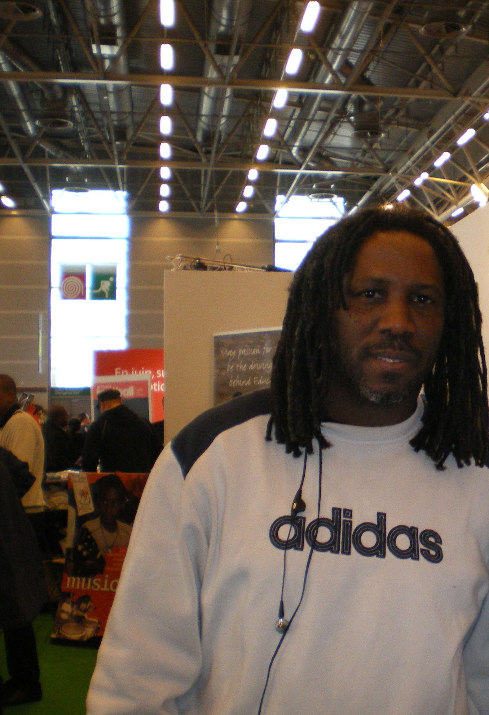 Jimmy Adjovi-Boco en mars 2008 lors du Salon Galaxy Foot.